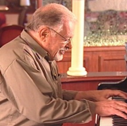 Sérgio Ricardo, nome artístico de João Lutfi, (Marília, 18 de junho de 1932) é um diretor de cinema, ator, cantor e compositor brasileiro.